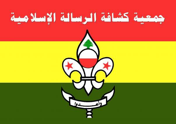 علم كشافة الرسالة الاسلامية